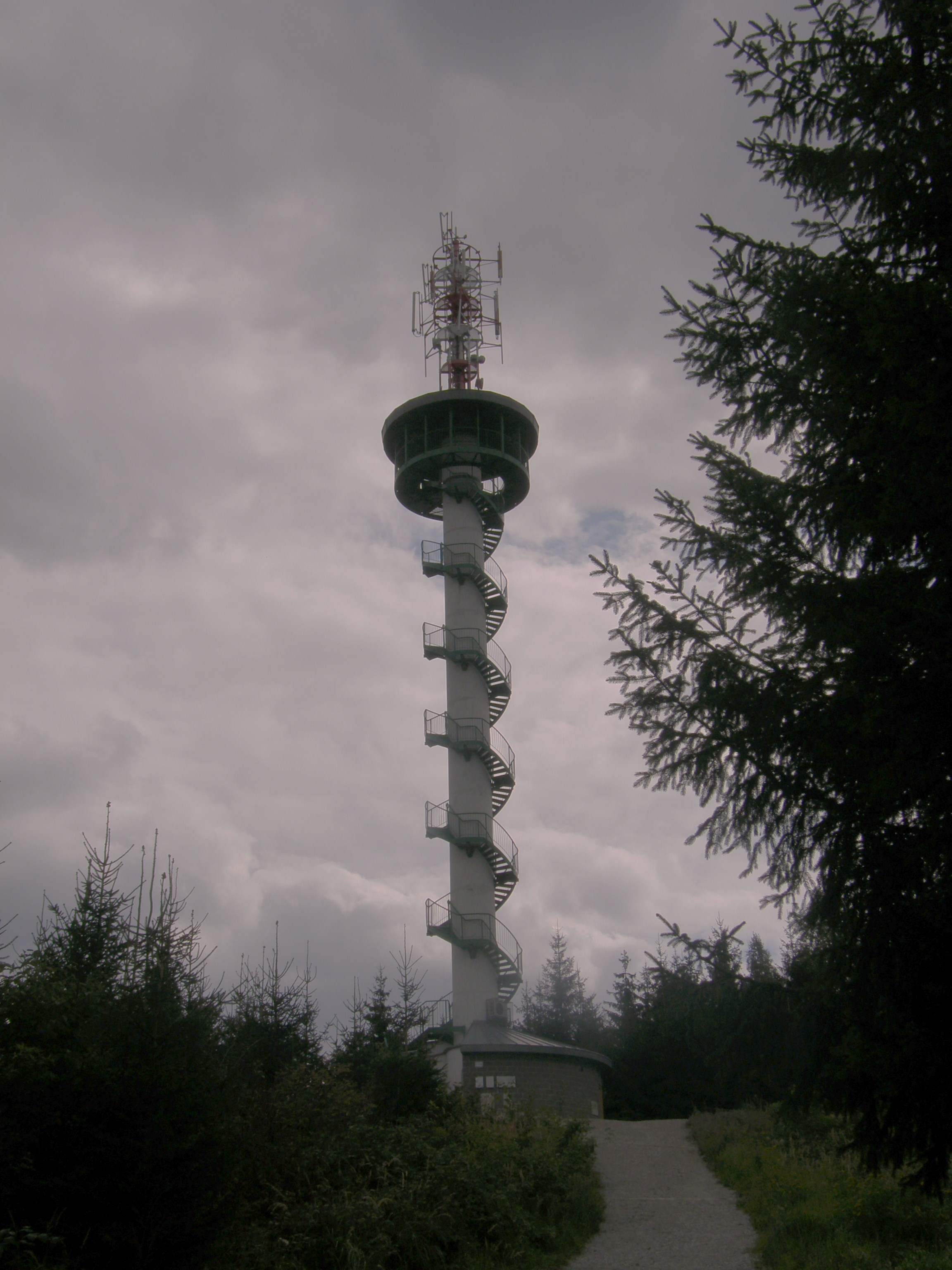 Rozhledna Podvrší u Veselice